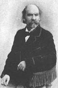 composer Archangelskiy Архангельский, Александр Андреевич